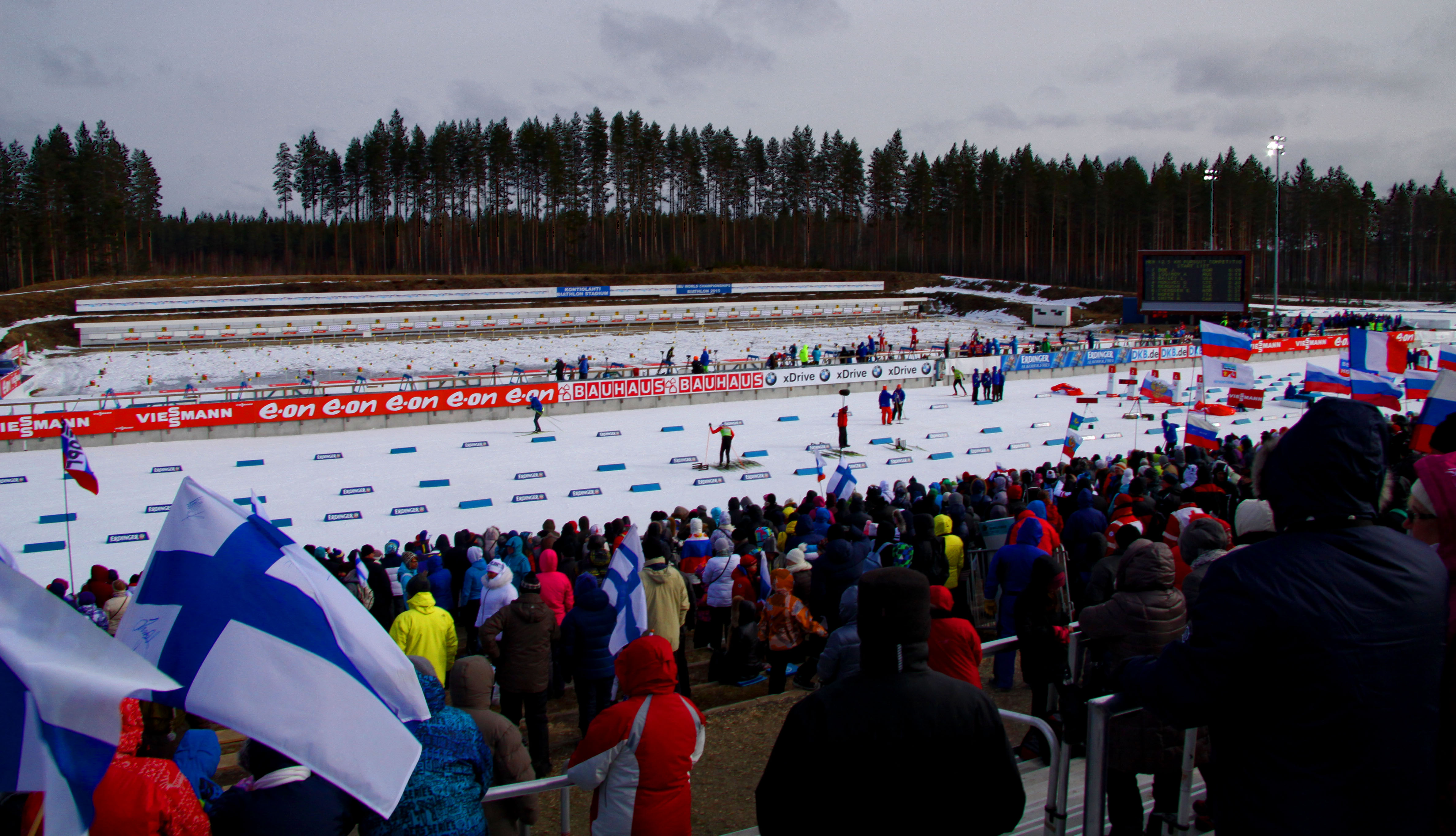 Kontiolahden ampumahiihtokeskus maailmancupin kisan aikaan, 2014.